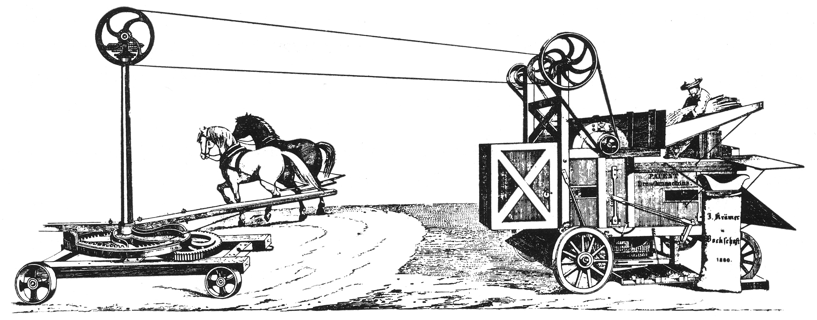 Farhbare Dreschmaschine mit Säulengöpel, Gebrüder Botsch, Patent 1876